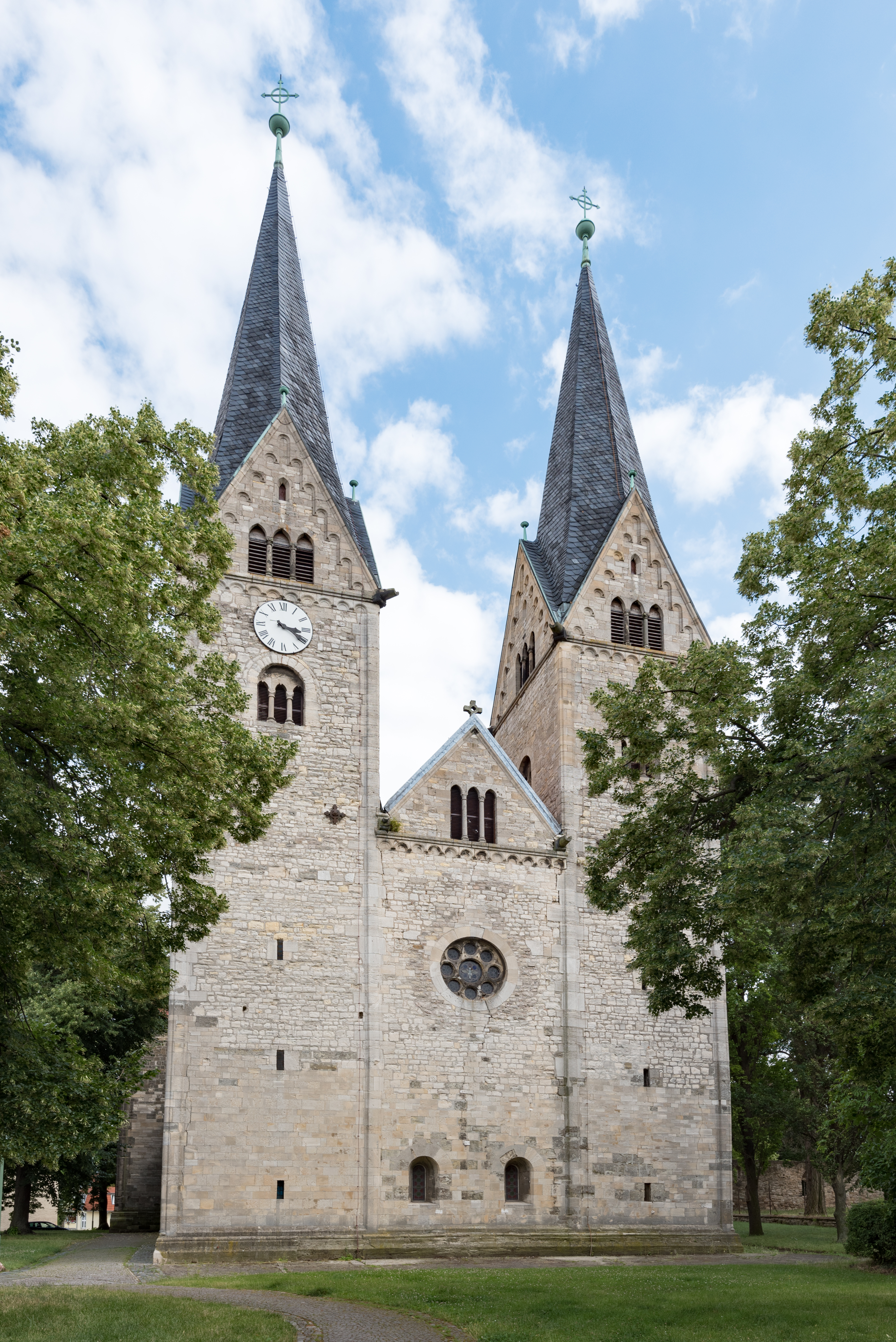 Hecklingen, Ehemaliges Kloster, Kirche St. Georg und Pancratius